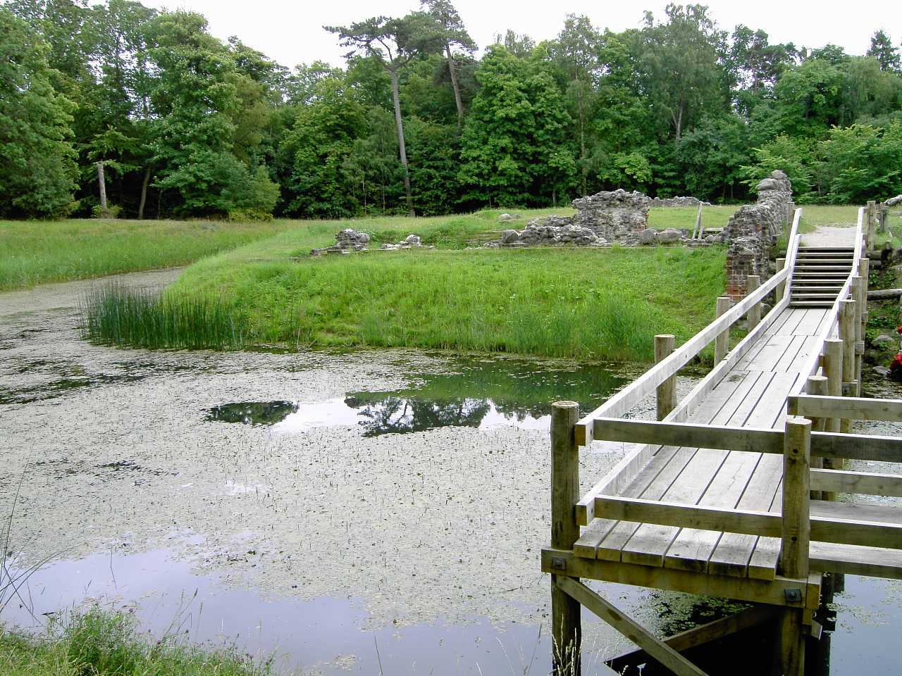 Asserbo Slotsruin